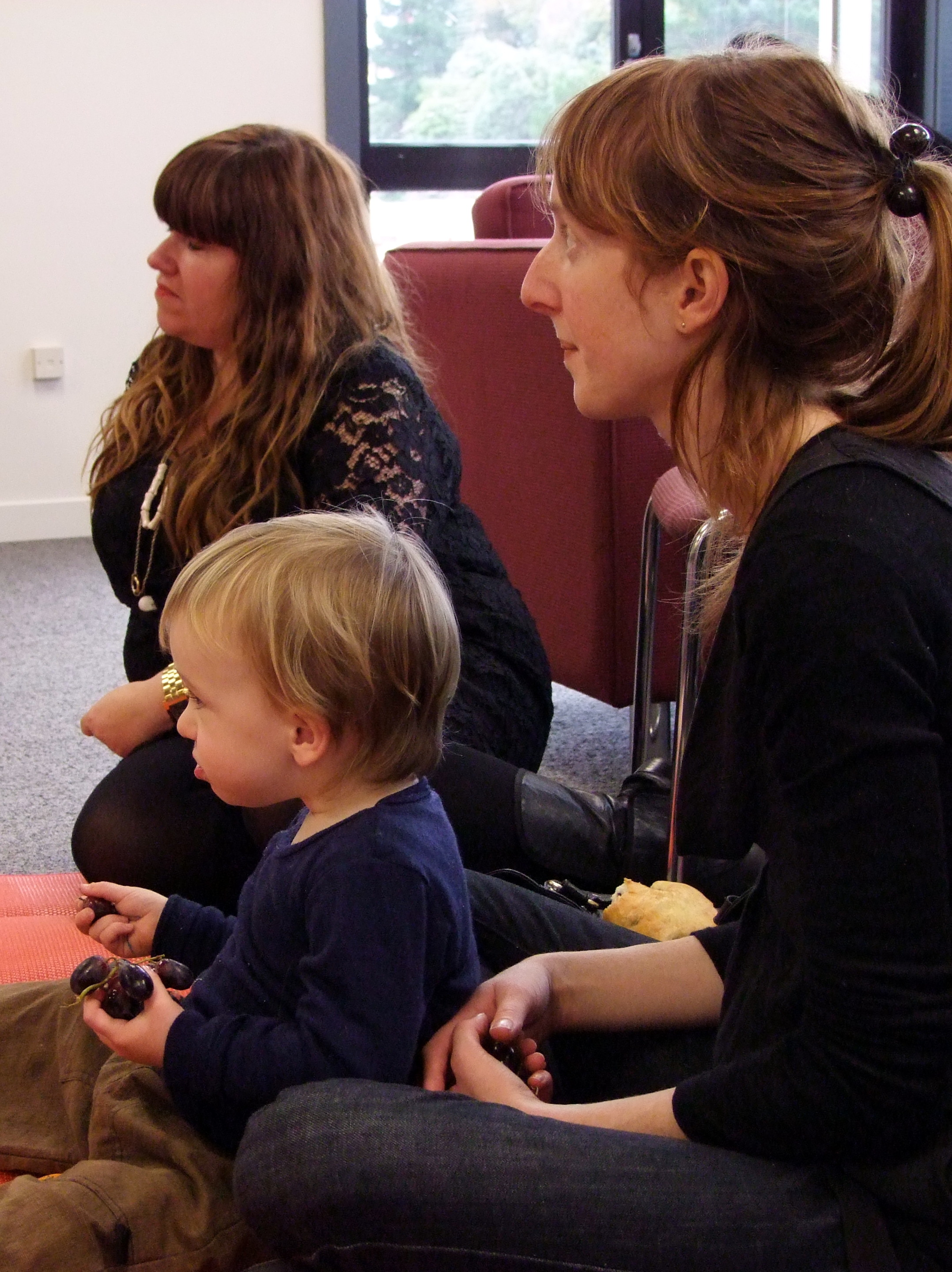 Paid parental leave picnic